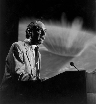 David H. Levy David Levy giving a talk at JPL.